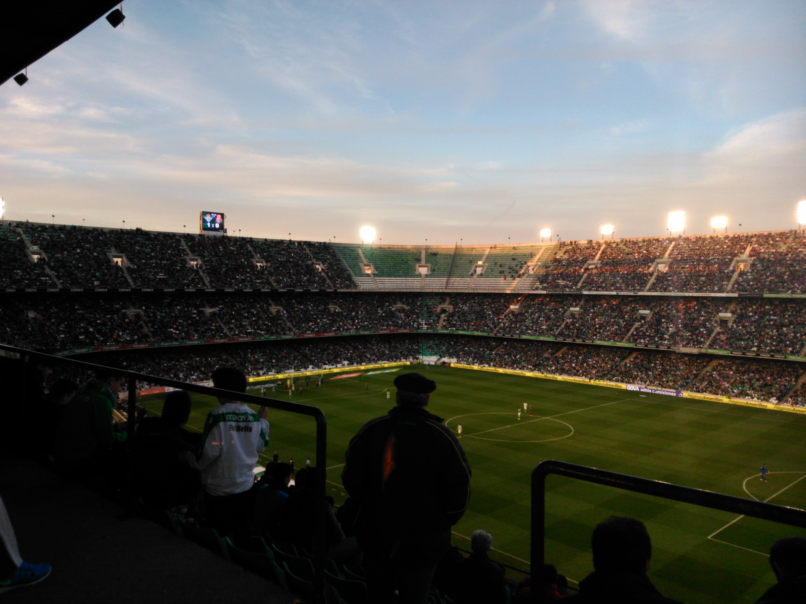 Estadio Benito Villamarín, gol norte y fondo (Sevilla).